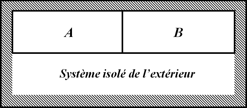 Schéma d'un système thermodynamique fermé divariant